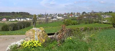 Sujet: Eng Vue op Munzen vum Knëppchen aus Kategorie:Gemeng Munzen